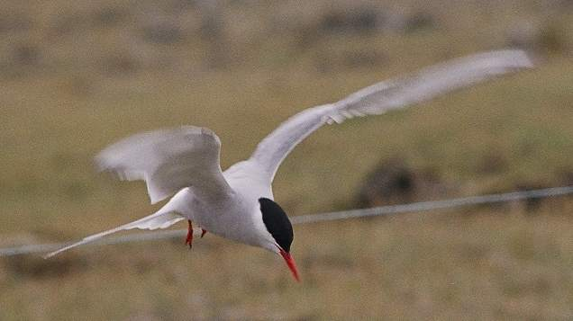 Sterna codalunga (Sterna paradisaea). Fotografata inizi luglio 2004 sulla penisola di Reykjanes presso Reykjanesbær nell'Islanda occidentale.